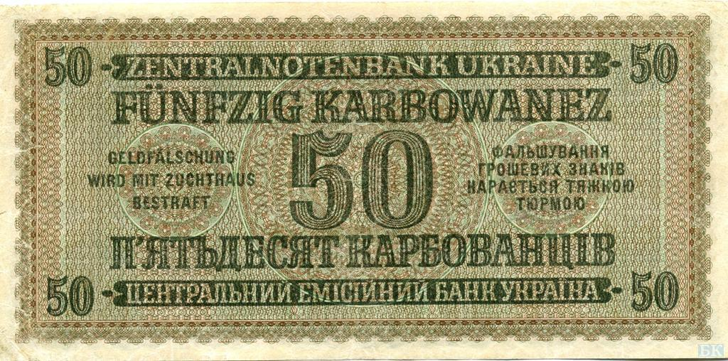 50 карбованцев Рейхскомиссариата Украина, Ровно, март 1942. реверс.